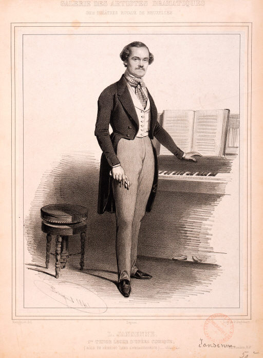 Louis Jansenne (1809- ?), c. 1840